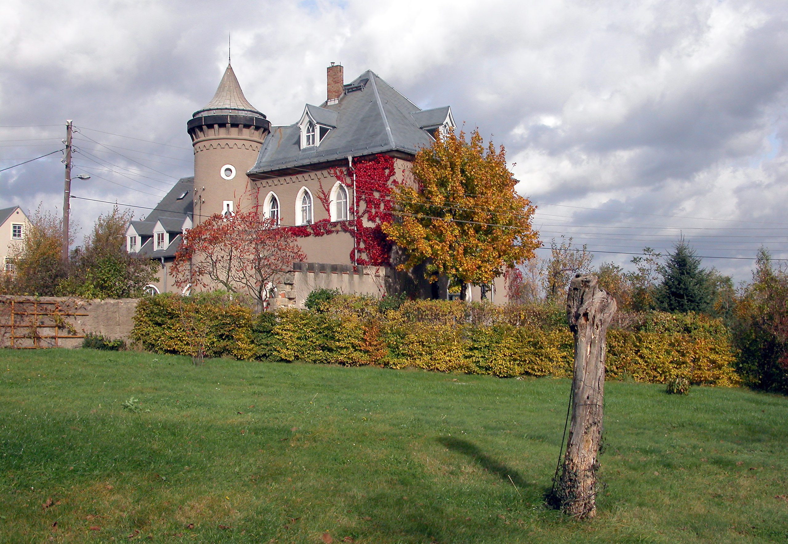 26.10.2005 01328 Rossendorf (Dresden), Gutsweg 4 (GMP: 51.056913,13.933017): Rittergut mit neogotischem Herrenhaus, 1840 von Johann Gottlob Quandt errichtet. Sicht von Südwesten. [DSCN7911.TIF]20051026040DR.JPG(c)Blobelt